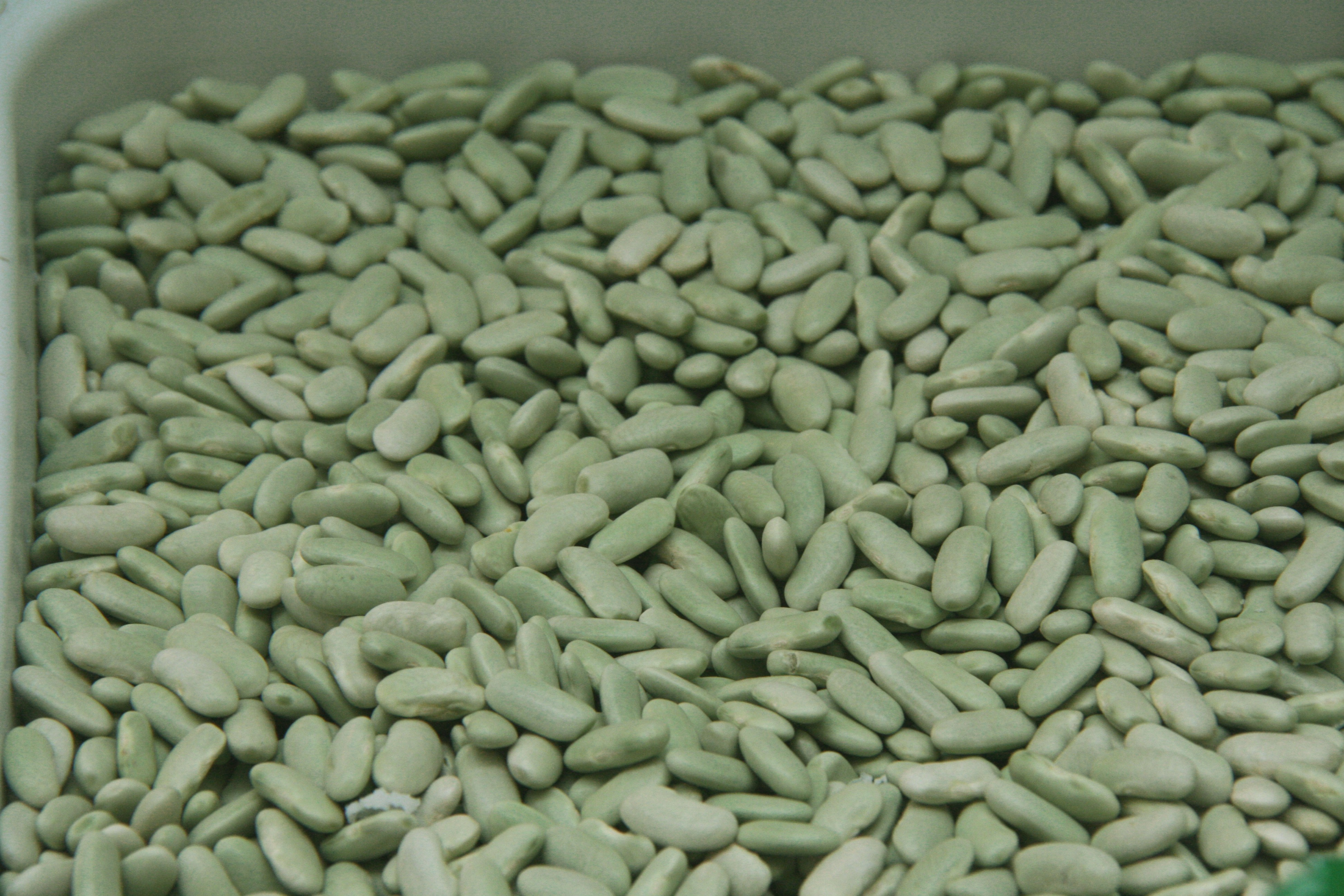 judías verdinas (fabinas verdes)